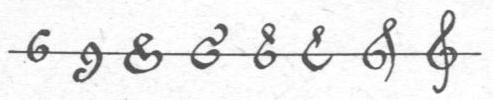 Koobak 13:05, 10 July 2006 (UTC) The evolution of the G clef. On the left is a G-character. Picture comes from: Wiechowicz Stanisław: Ćwiczenia w starych kluczach. Część pierwsza. 3-głosowe utwory dawnych mistrzów (XIII-XVIII w.). Cracow, Polskie Wydawnictwo Muzyczne, 1953.